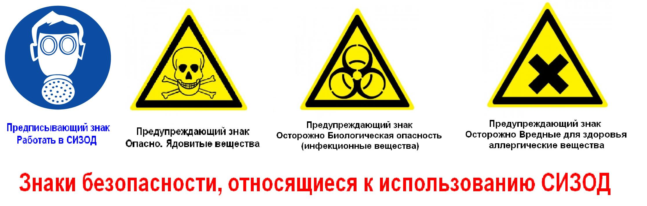 Знаки безопасности, используемые при необходимости применять СИЗОД